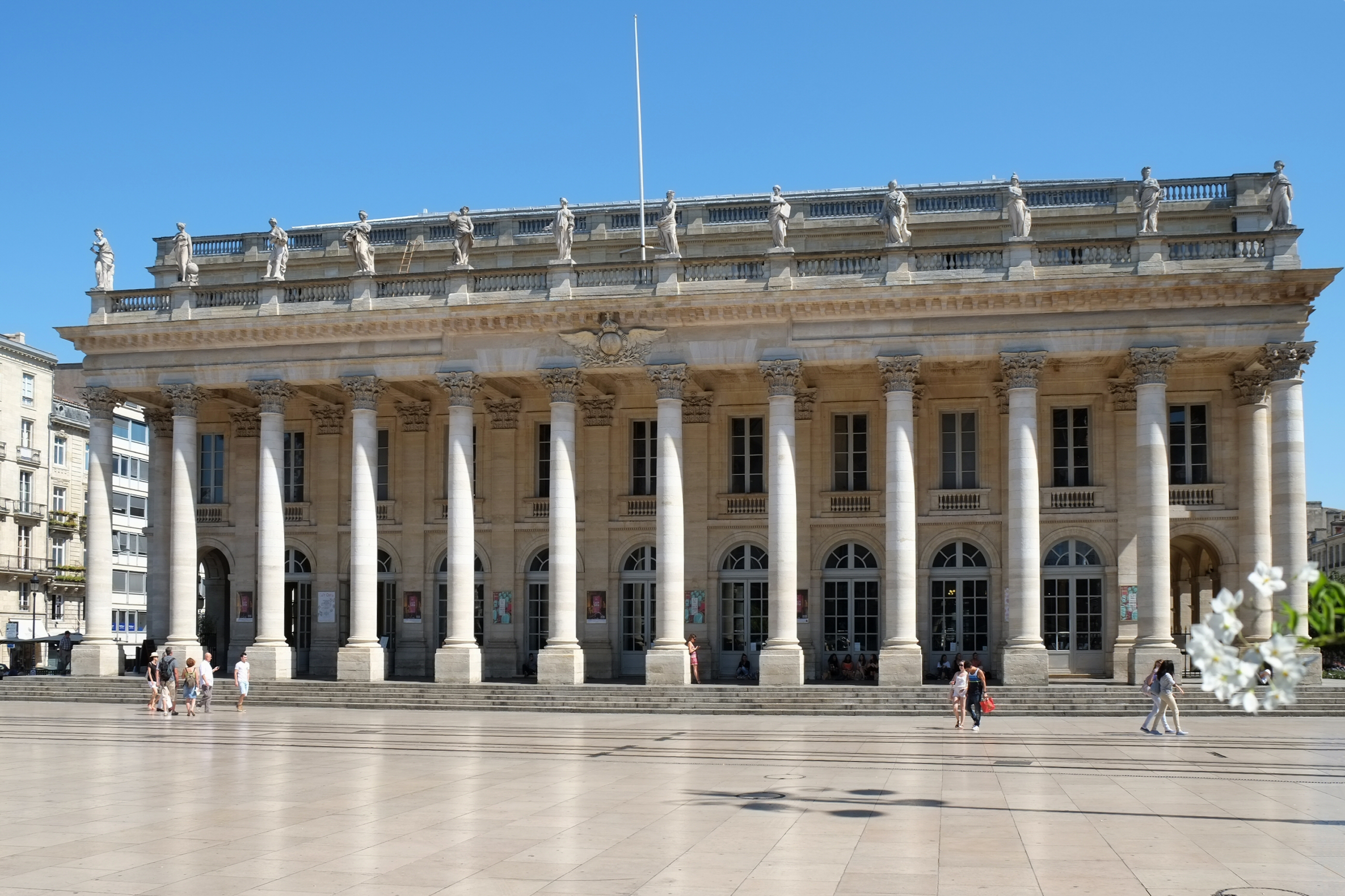 Grand Théâtre siège de l'Opéra national Bordeaux Gironde France